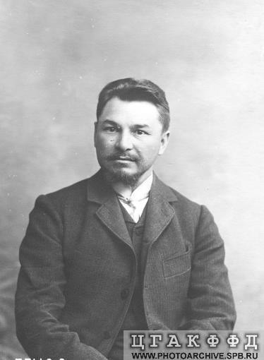 Депутат Первой Государственной думы от области войска Донского Федор Дмитриевич Крюков.